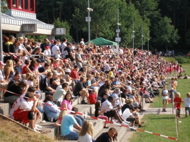 Volle Tribüne beim letzten Heimspiel der Kaiserslautern Pikes in der Saison 2008 (1600 Zuschauer)